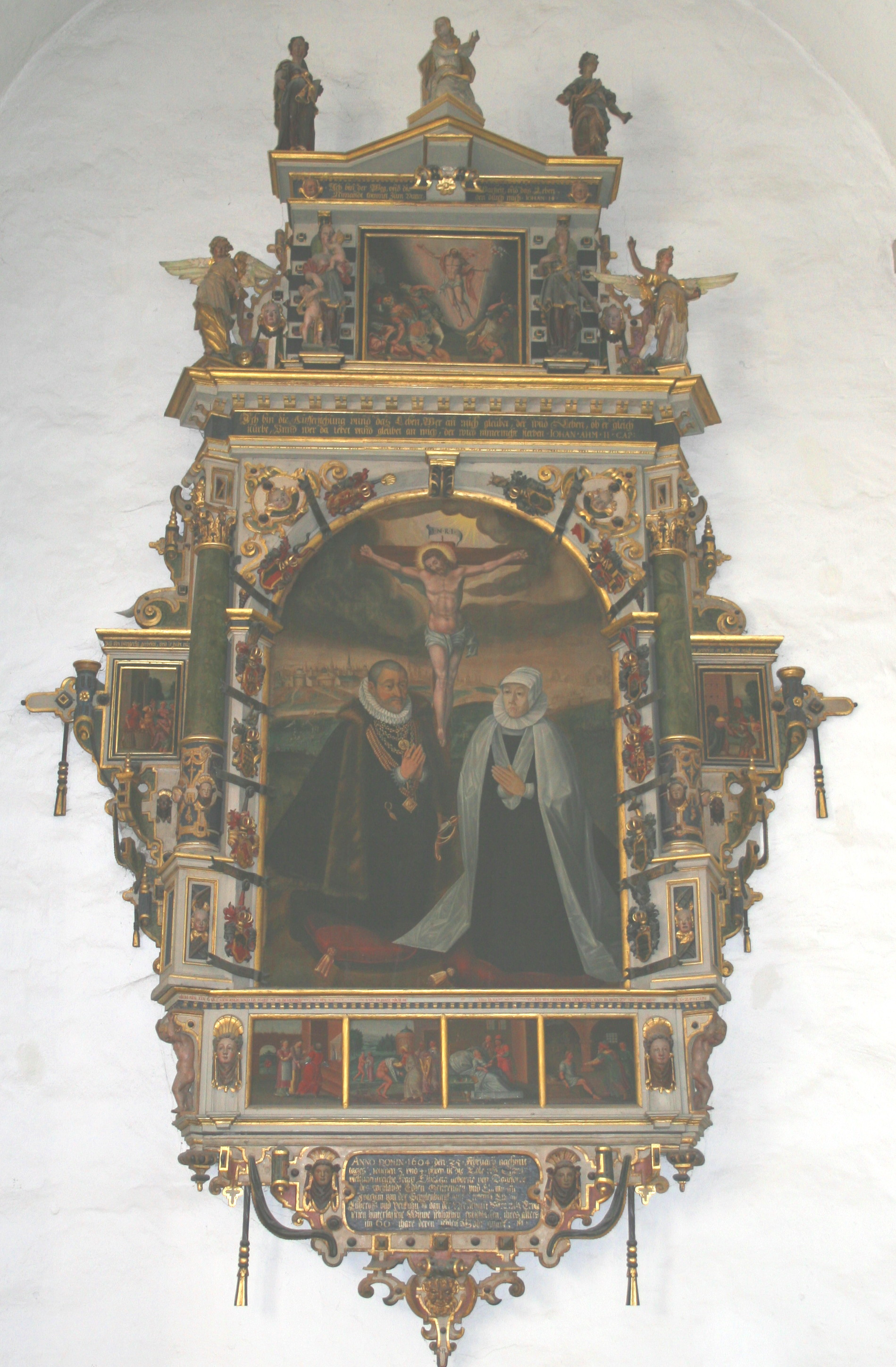 Denkmal für Joachim und Elisabeth v. Schulenburg von Jürgen Röttger im Braunschweiger Dom auf der Nord-Ostseite